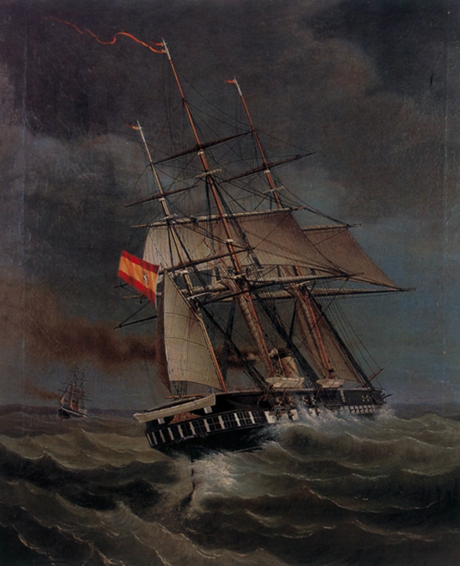 Captura de la corbeta de hélice Tornado por la fragata de hélice Gerona. Es una obra adquirida por el Estado español, según consta en el (BOE), ([1]).